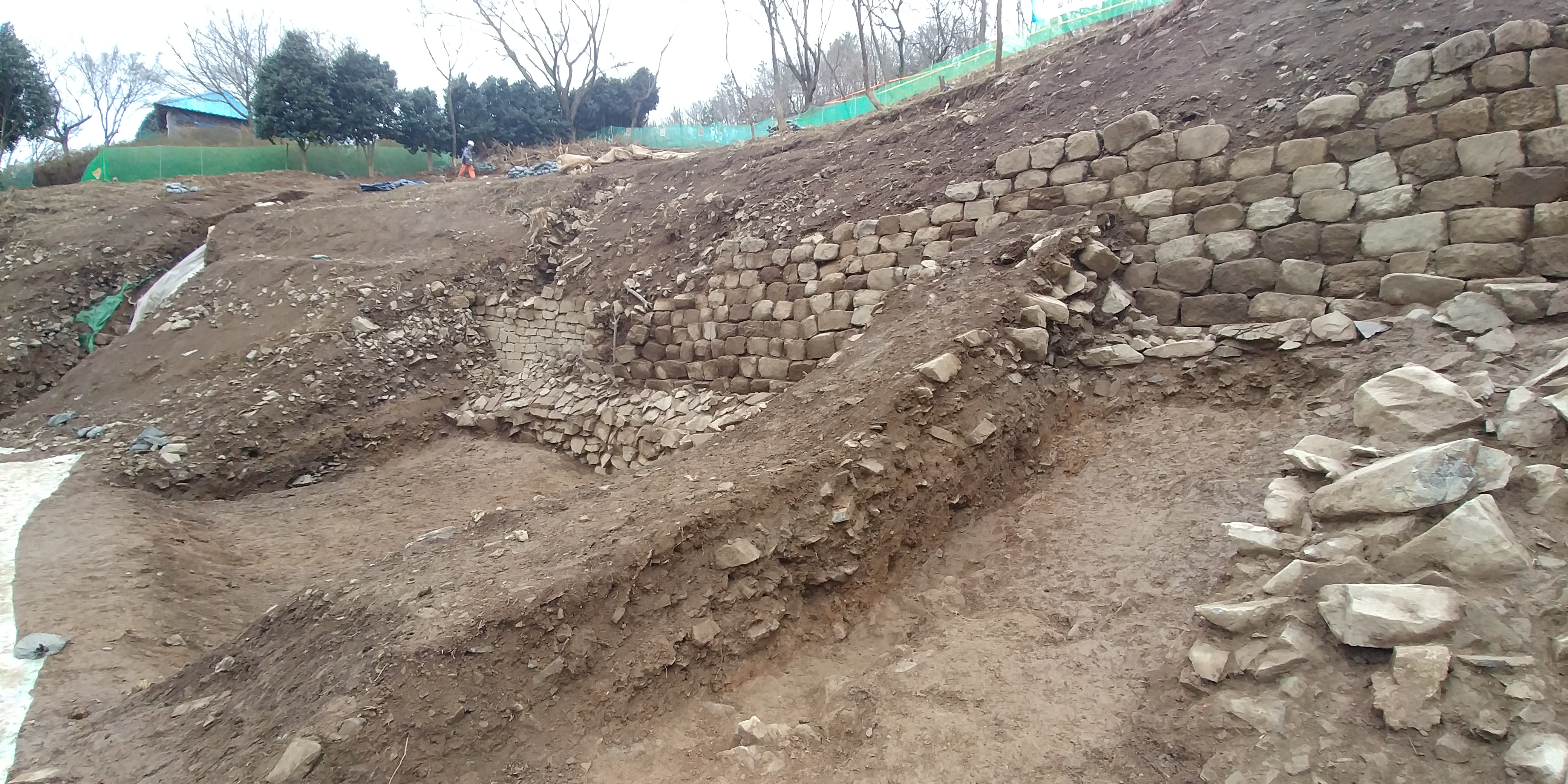 지난 2019년 12월 진행된 배산성지 3차 발굴조사 당시의 사진 신라시대 때 축성된 축대와 치성 등을 확인할 수 있다.